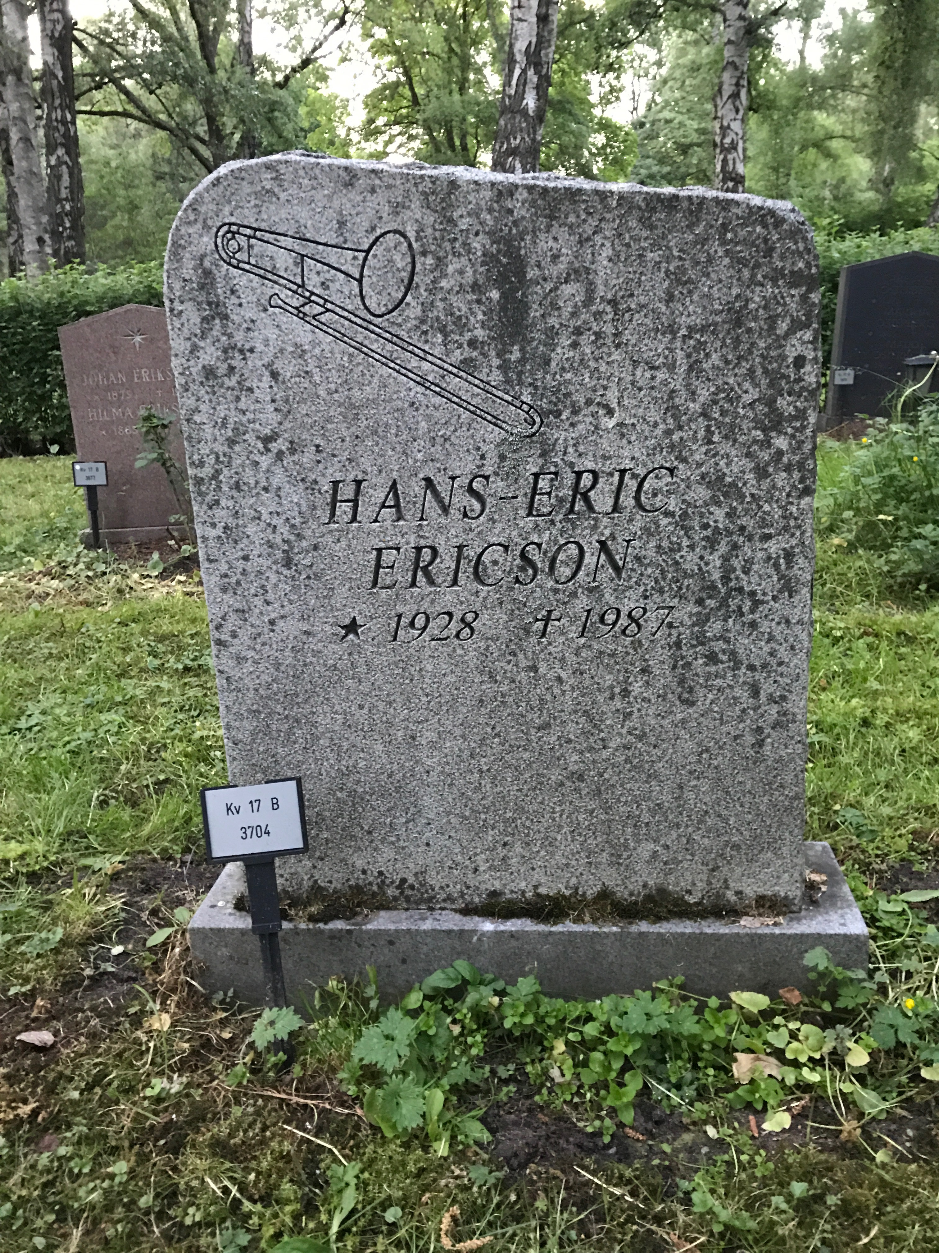 Solna, Sverige, June 2018